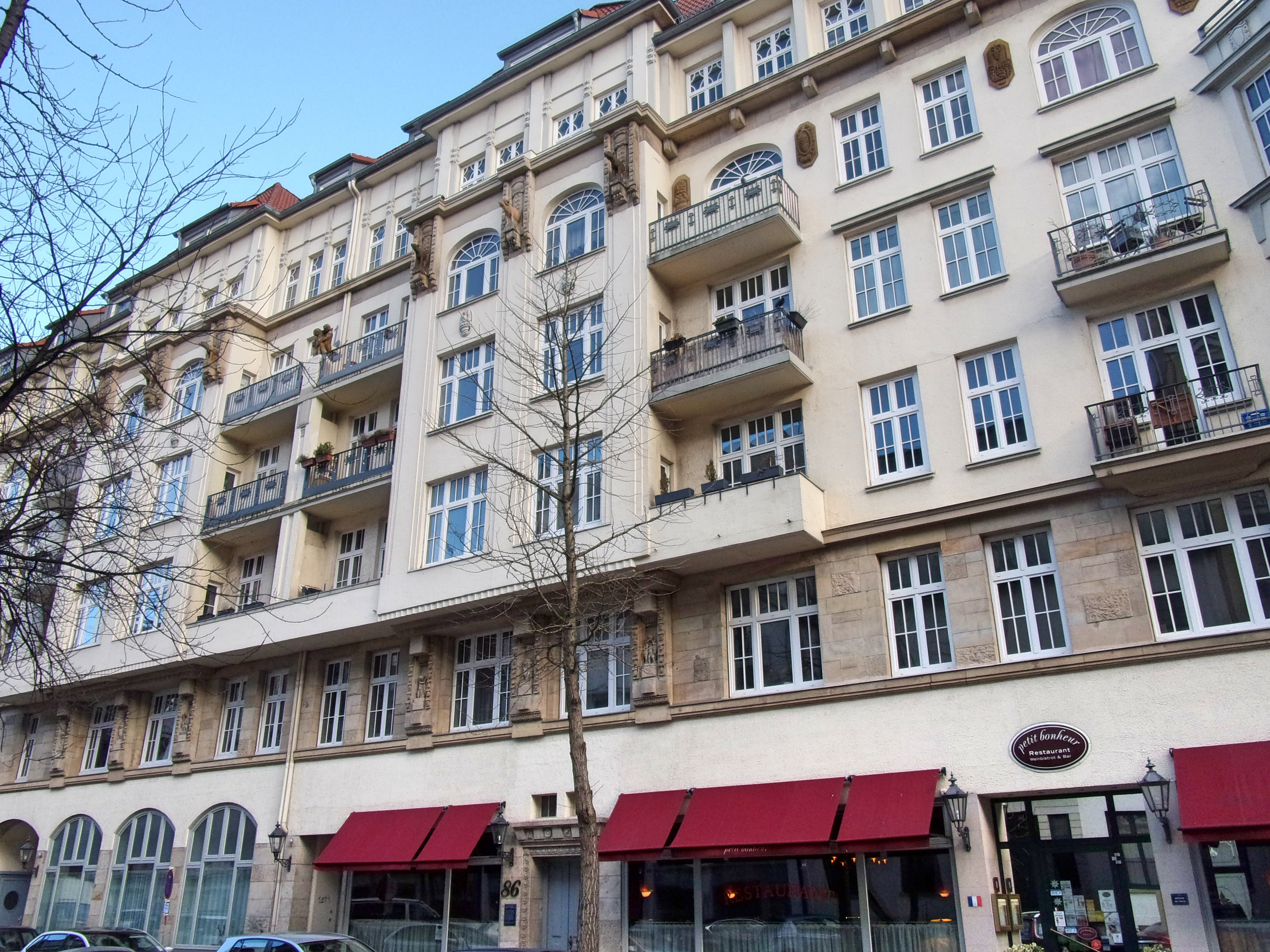 Wohnhaus Hütten 86 von Ludwig Wolf, einer der Brüder des bekannten Wolf-Trios, Hamburger Gesangs-Humoristen Ende des 19. Jahrhunderts. Die Gebrüder Wolf wohnten und lebten in der Hamburger Neustadt, Ludwig Wolf in der Straße Hütten 86. Im Foto das Wohnhaus von Ludwig Wolf. Bekanntestes Lied: " An de Eck steiht ´n Jung mit ´n Tüddelband. " This is a photograph of an architectural monument.